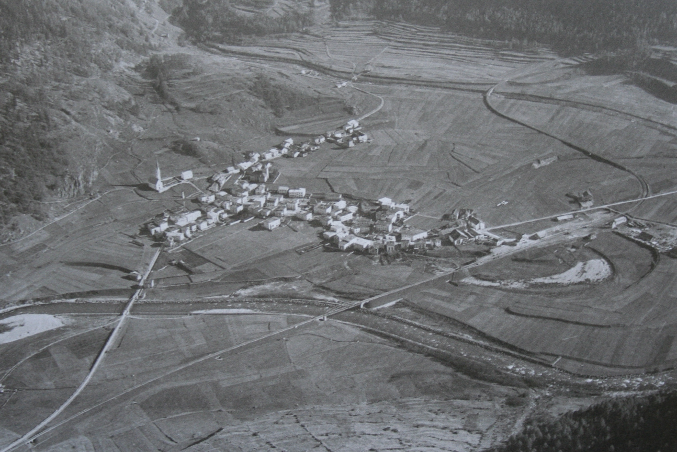 Zernez GR 1925, Aufnahme von Walter Mittelholzer (1894 - 1937)